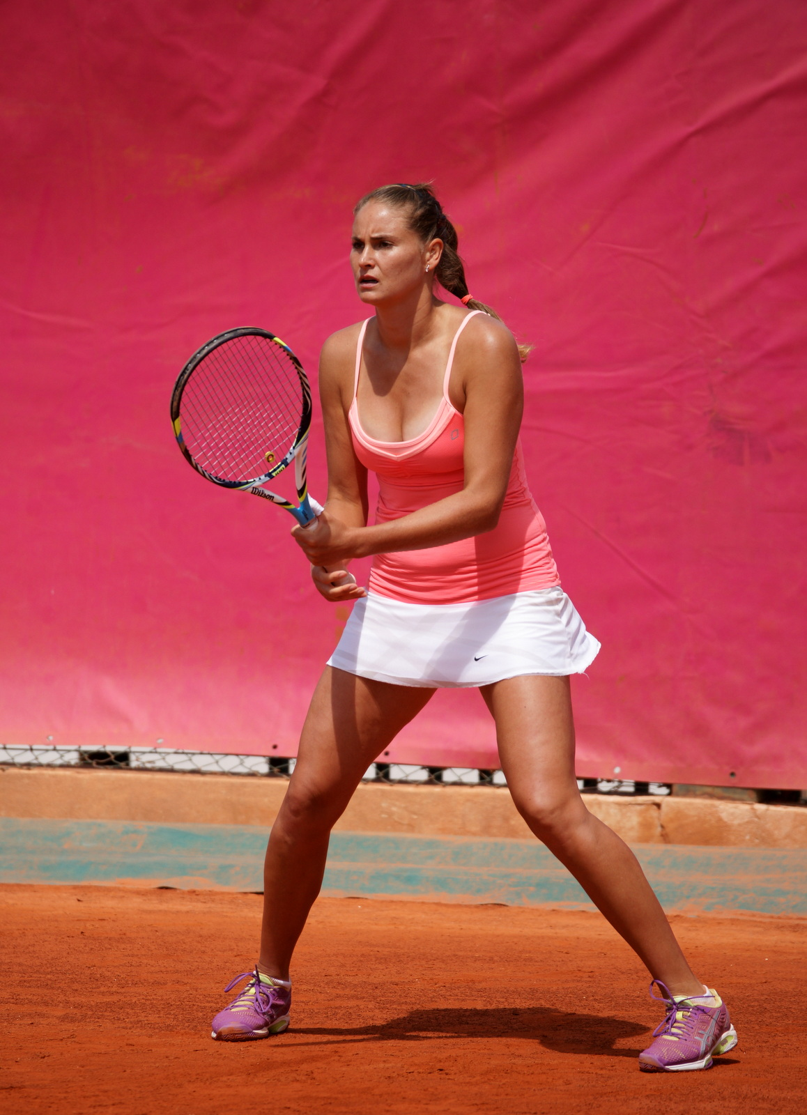 Alexandra Panova ITF Cagnes-sur-Mer 2014